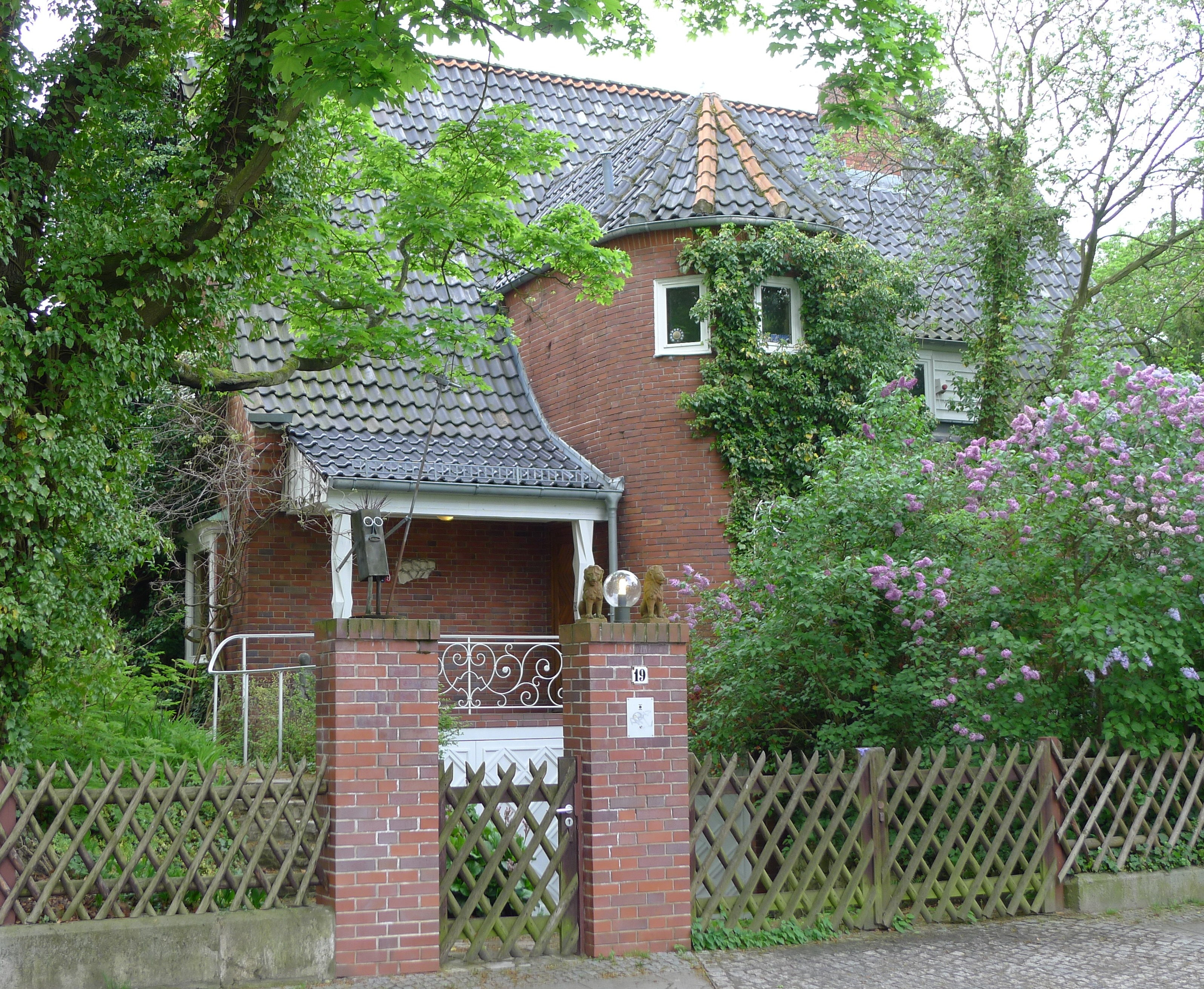 Villa